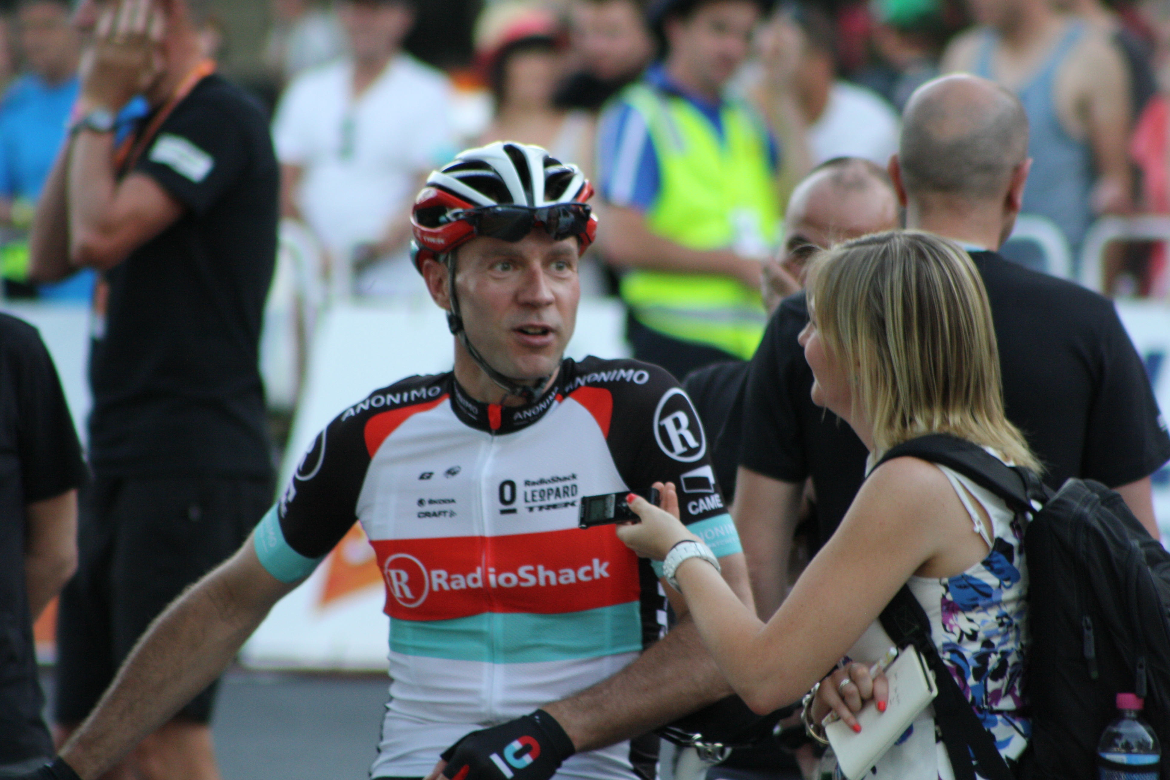 Jens explains it all!